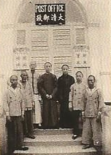 公有領域清朝百年老照片